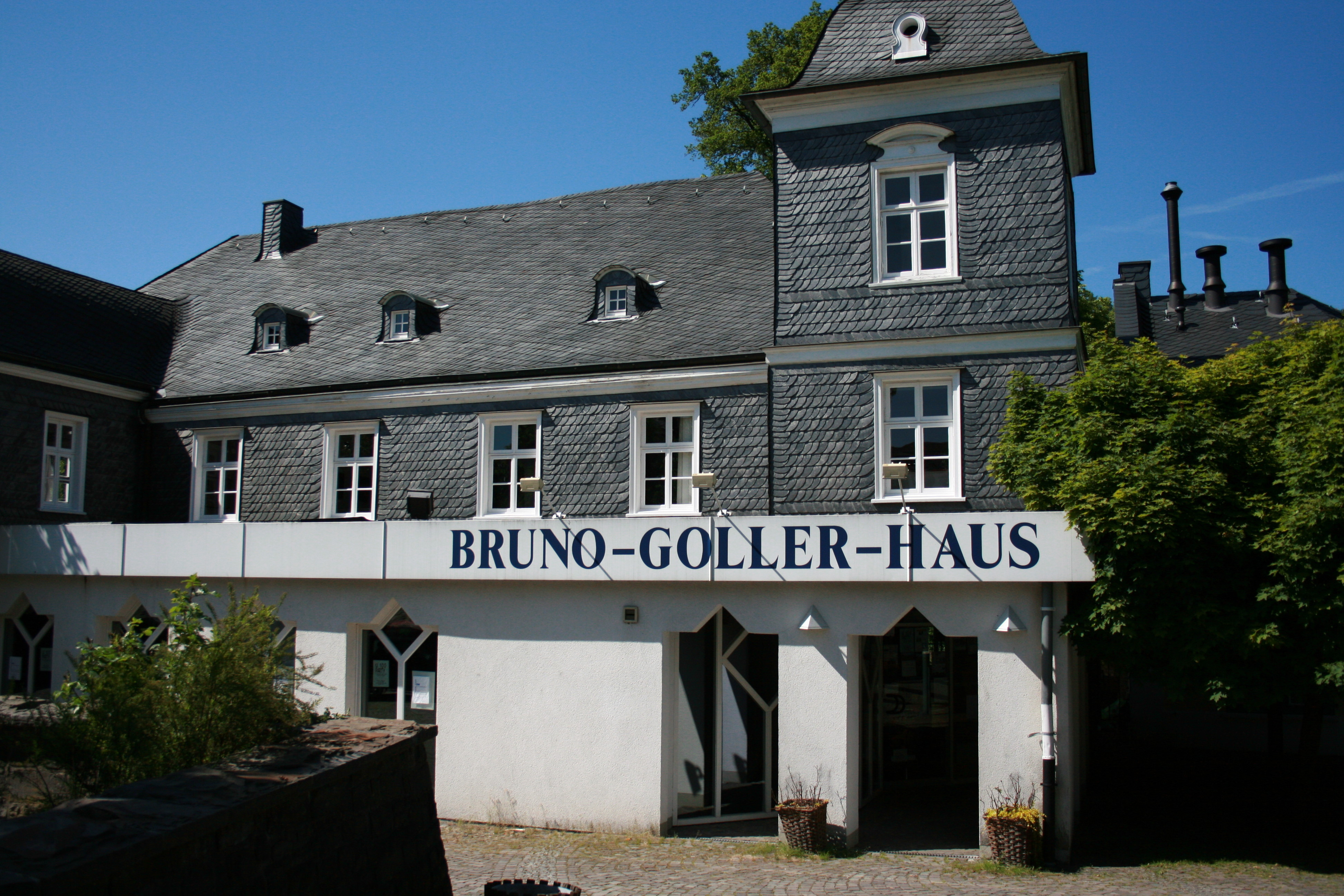 Bruno-Goller-Haus, Brückenstraße in Gummersbach